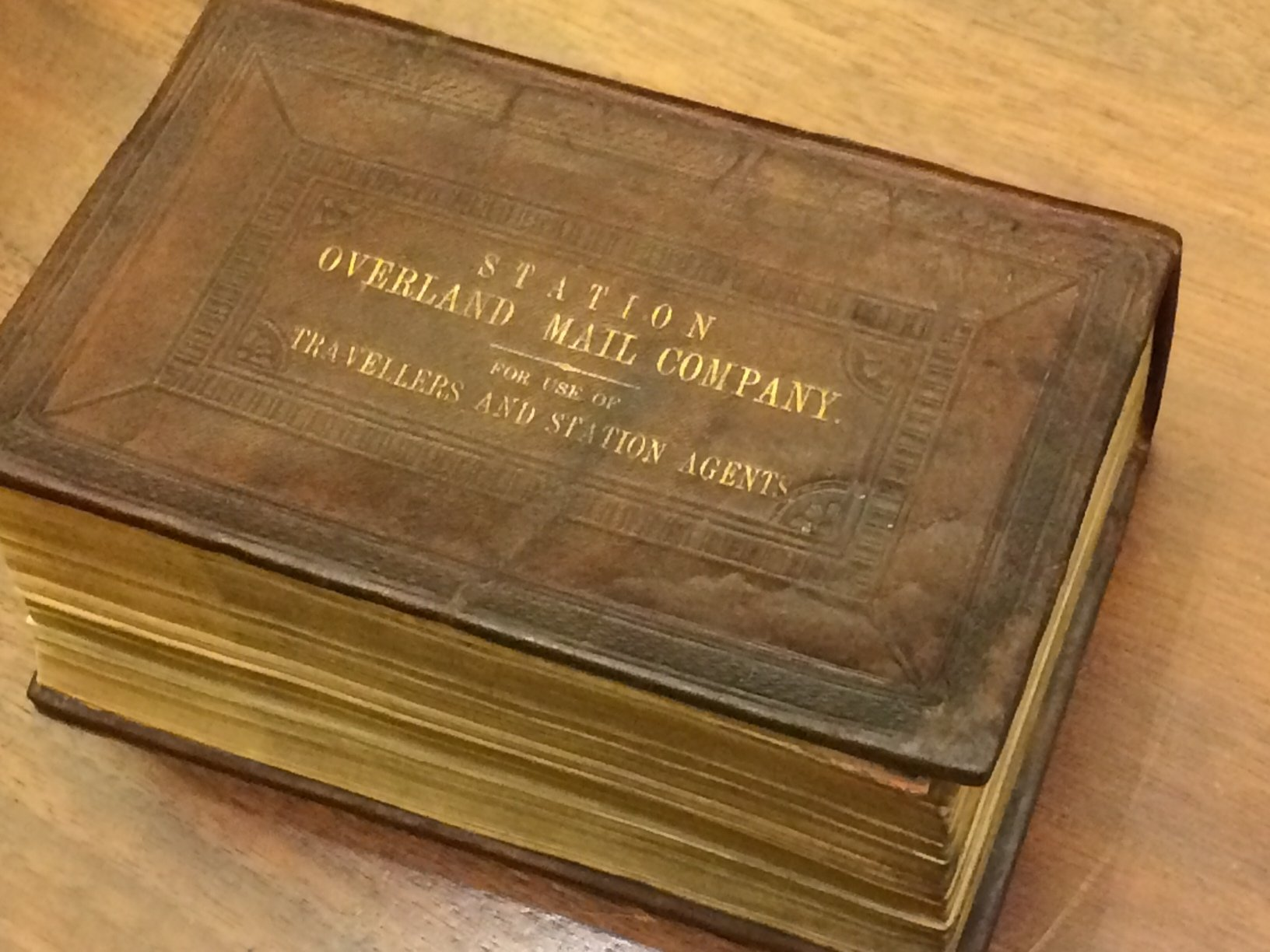 Butterfield Overland Mail Bible